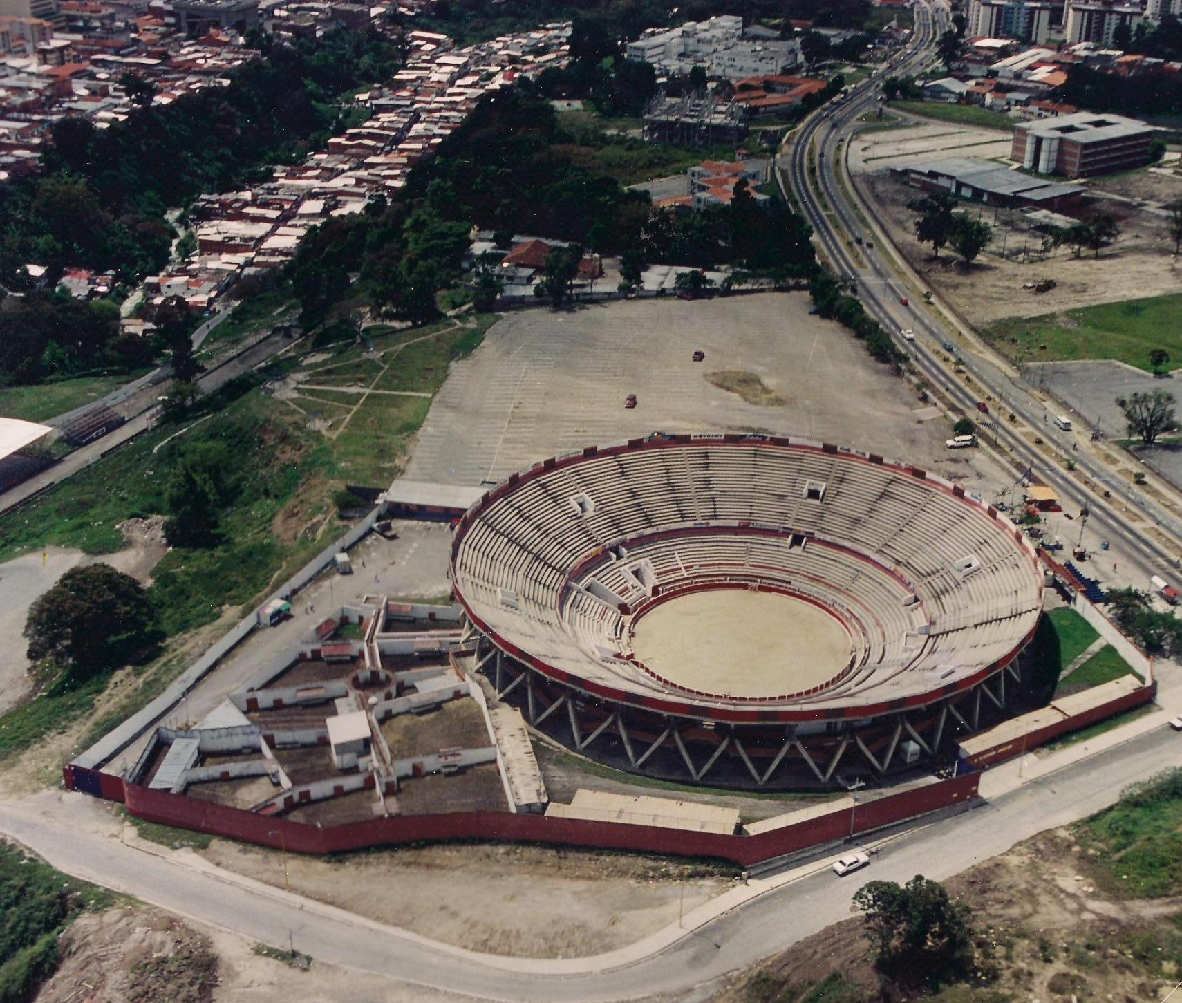 Noi MeridaItalia, rilasciamo l'immagine Plaza_de_Toros_Román_Eduardo_Sandia,_Mérida_2.jpg sotto licenza cc-by-sa 3.0 di cui siamo autori, l'immagine raffigura la Plaza de Toros della Città di Mérida (Venezuela), a Wikimedia Italia, provvederemo anche a caricarla su commons. Saluti Calorosi----MeridaItalia (msg) 12:52, 10 mag 2010 (CEST)